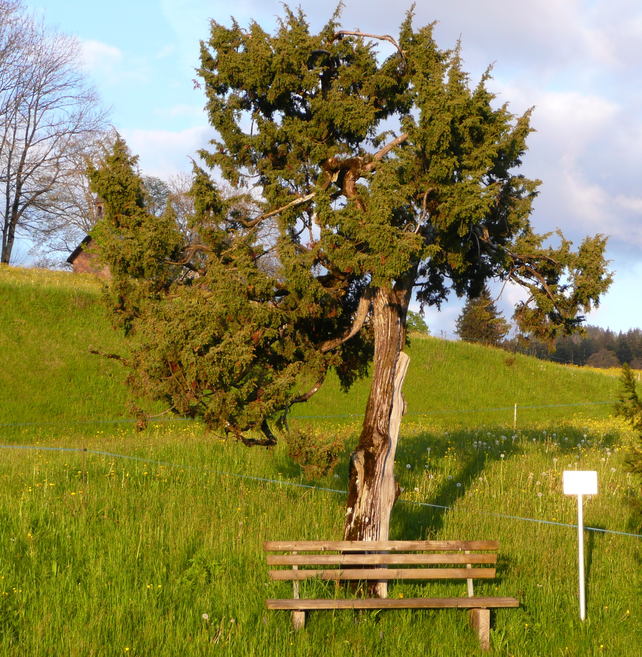 Baumförmiger Wacholder (Ammenegg) This media shows the natural monument in Vorarlberg with the ID 10.